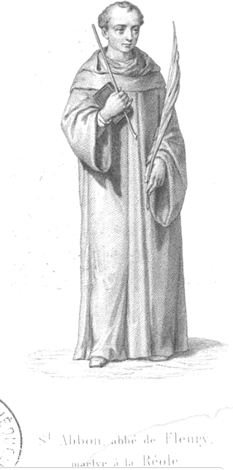 Pardiac, J.-B., abbé, Histoire de Saint Abbon, abbé de Fleury-sur-Loire et martyr à La Réole en 1004 : avec une introduction sur le Xe siècle, Paris, Librairie Jacques Lecoffre, 1872 ː portrait.